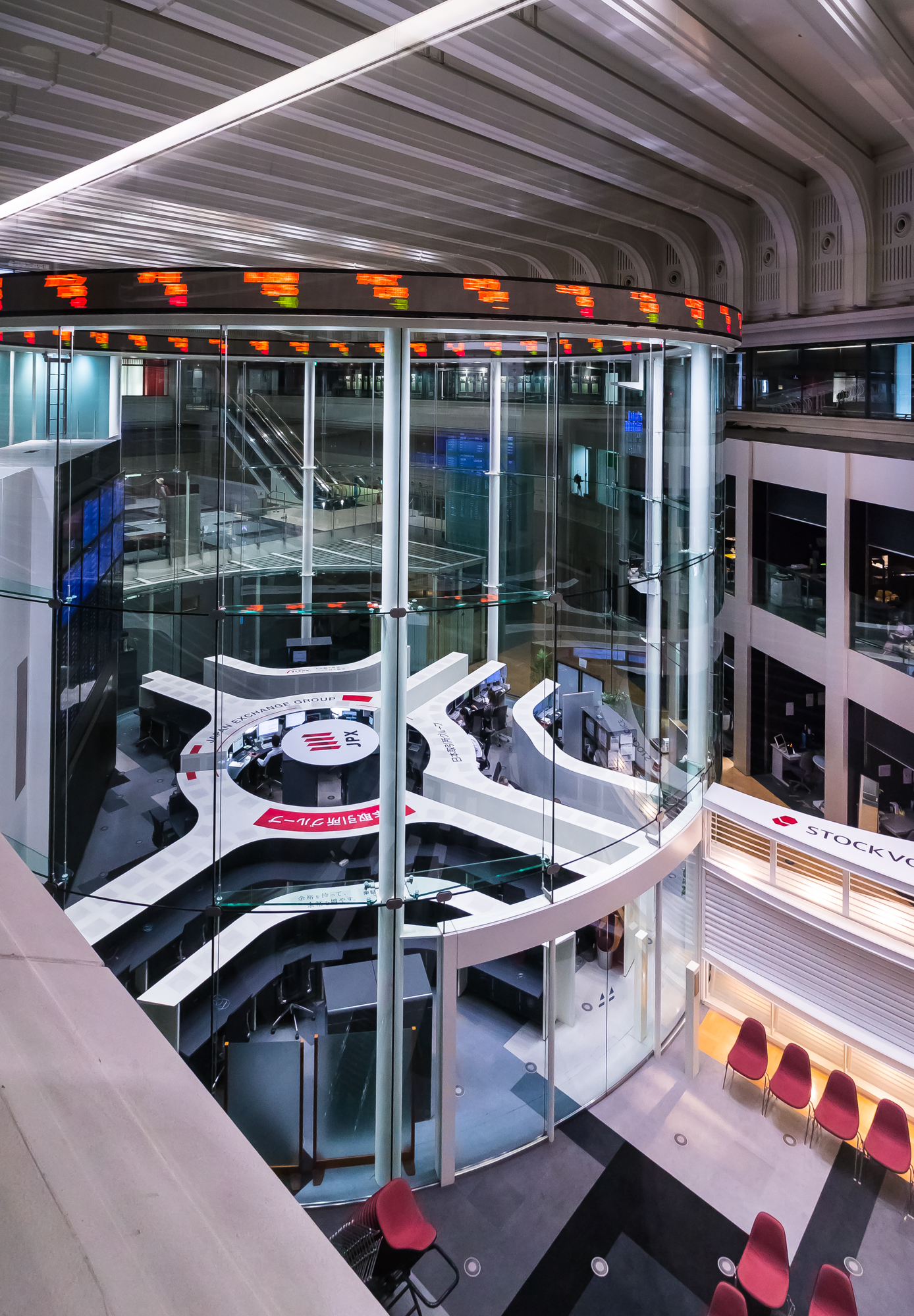 東京証券取引所のメインルーム.